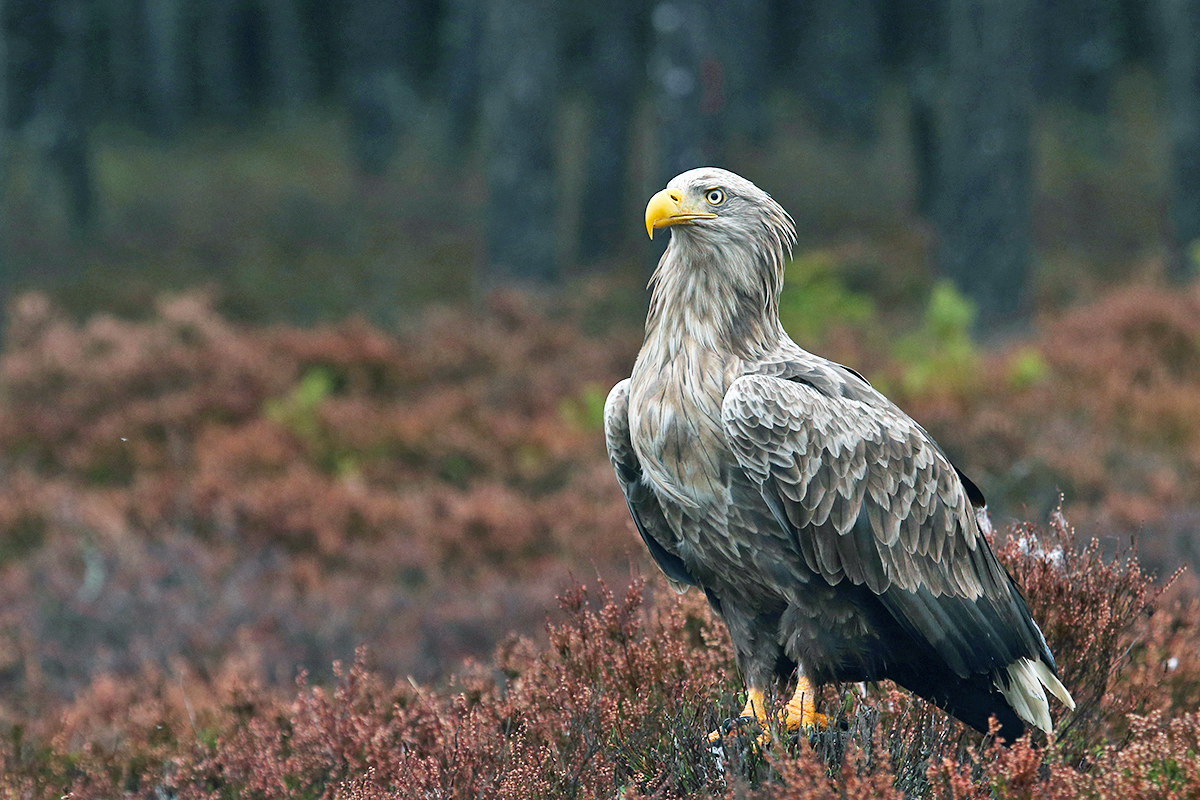 Täiskasvanud merikotkas Hiiumaa rabas.